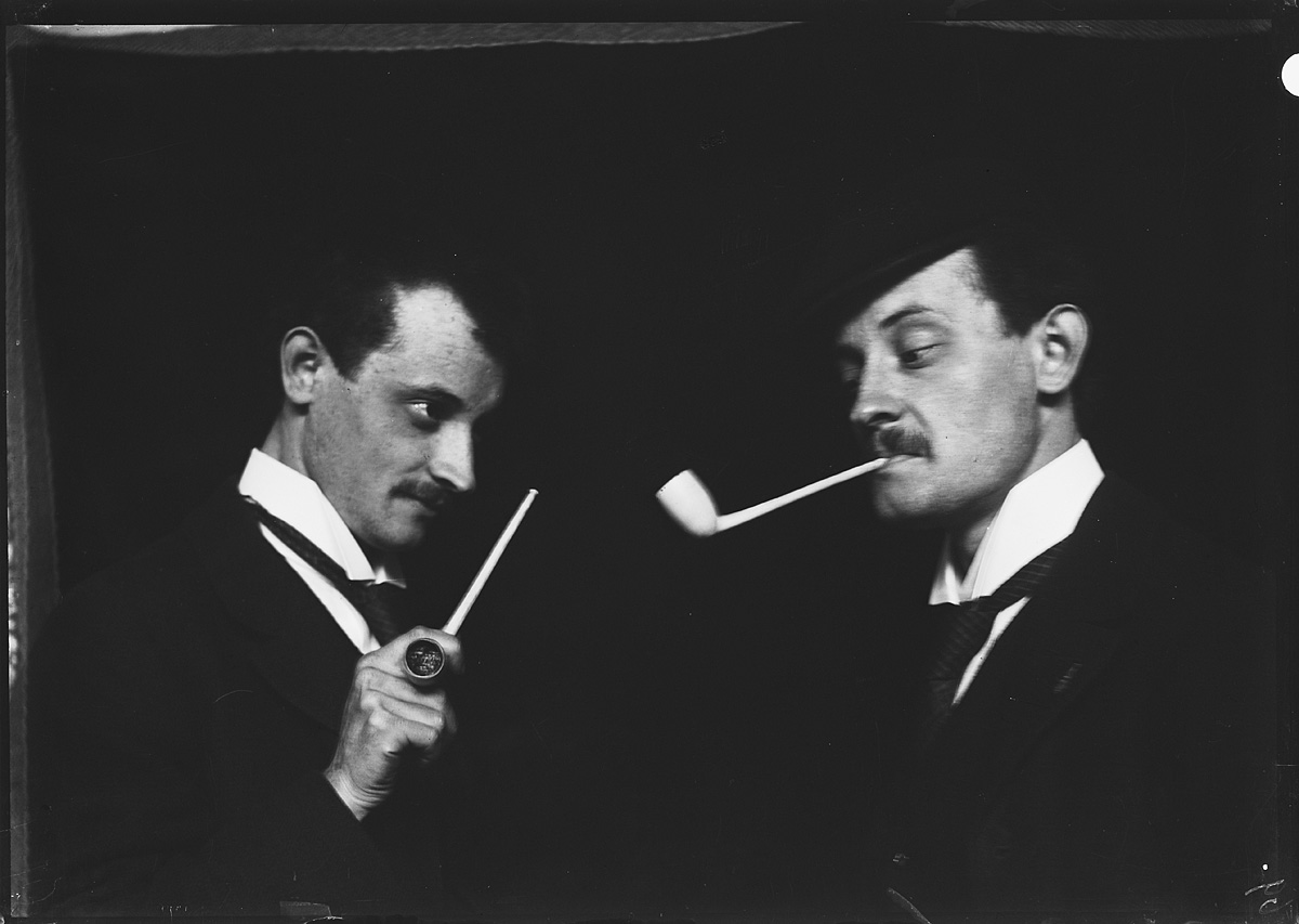 Glasnegatief: Arthur van Schendel, dubbelportret.